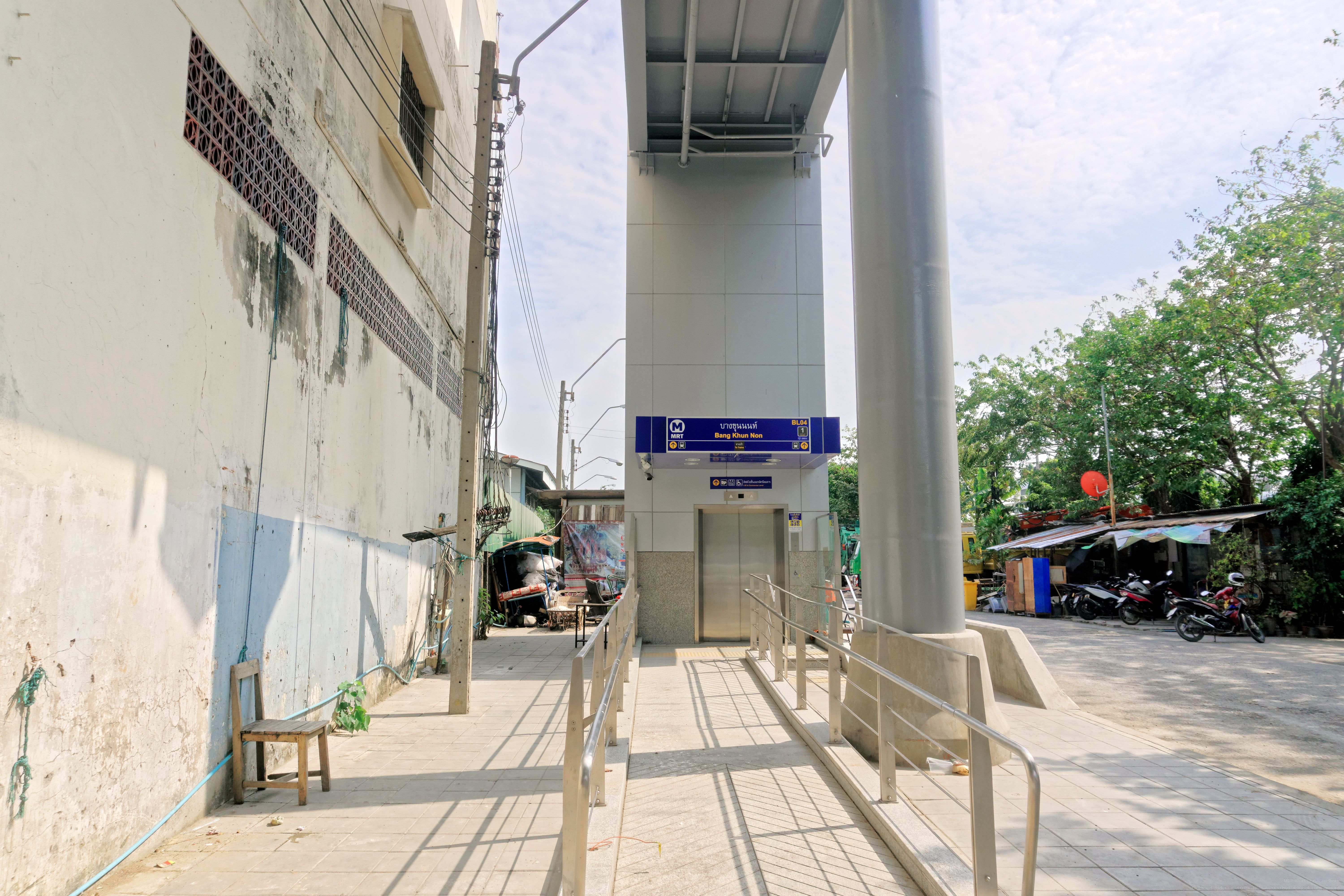 MRT Bang Khun Non – Exit 1 lift